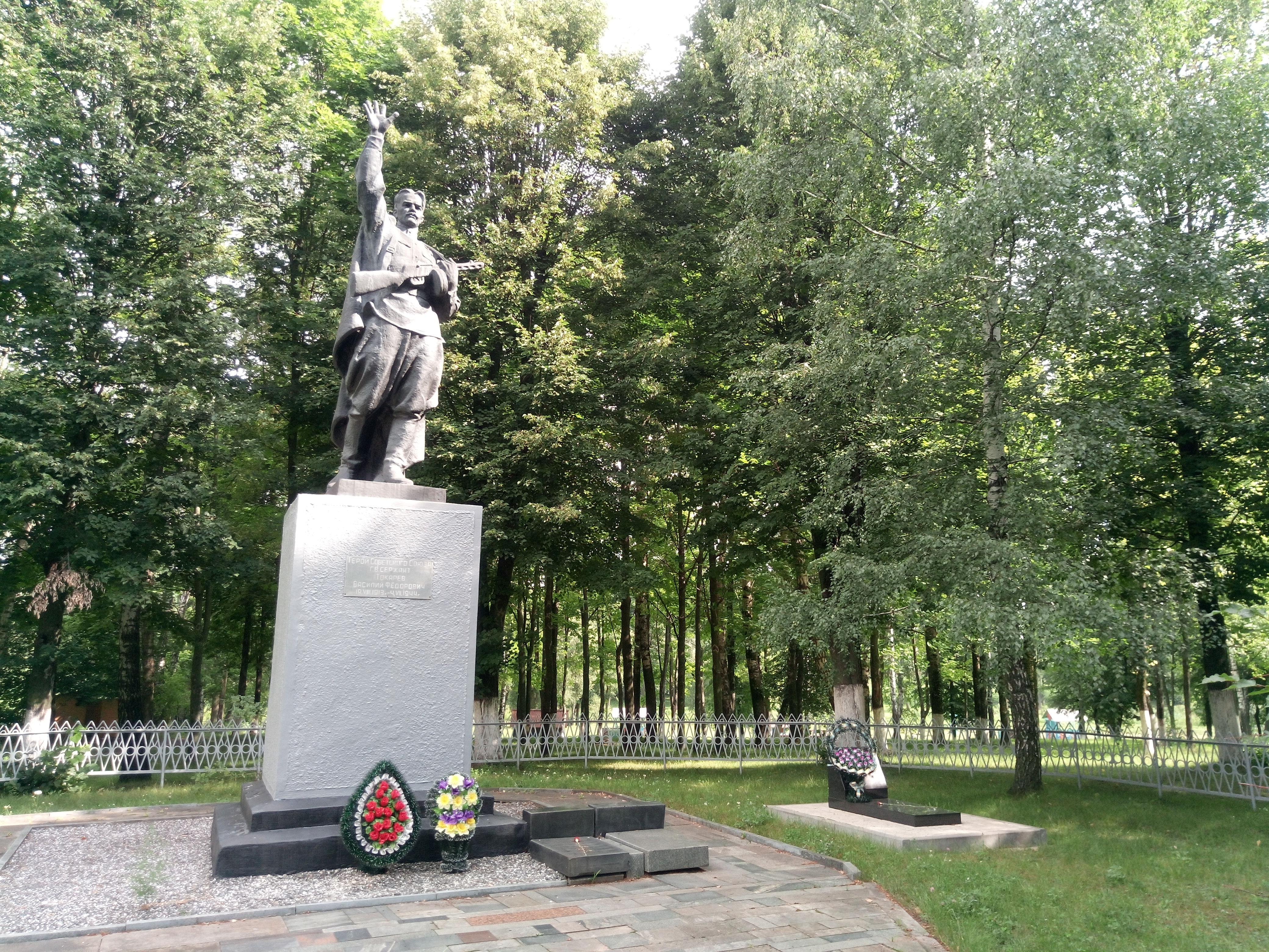 Помнік В.Ф.Токараву.